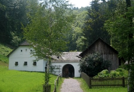 Dreikanthof im österreichischen Waldviertel